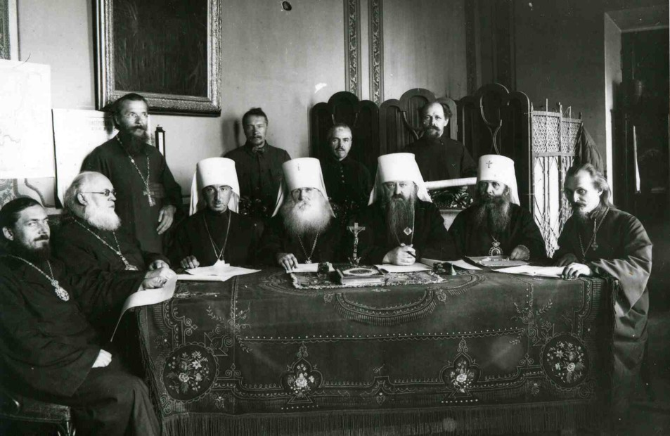 Заседание обновленческого Синода. 1926 год. сидят: "архиепископ" Георгий Жук, "архиепископ" Георгий Добронравов, "митрополит" Александр Введенский, "митрополит" Вениамин (Муратовский), "митрополит" Серафим (Руженцев), "митрополит" Алексий (Баженов), "протопресвитер" Павел Красотин стоят: "протоиерей" Николай Попов, профессор Сергей Зарин, профессор Борис Титлинов, "архидиакон" Сергей Добров